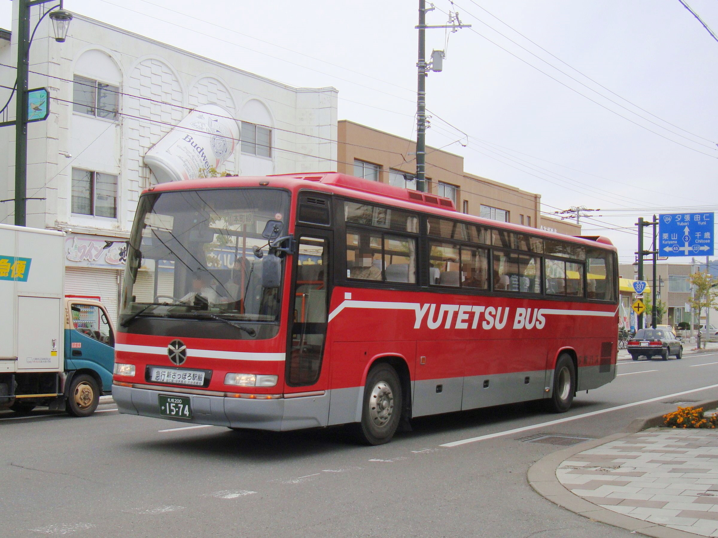 Yūbari to Sapporo